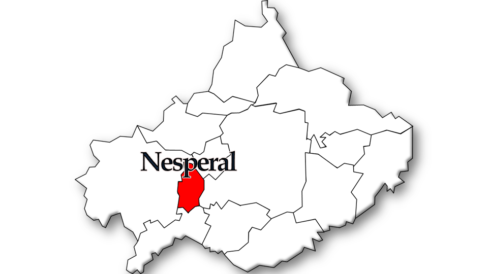 População